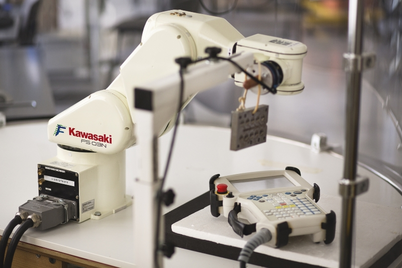 Kawasaki FS03n